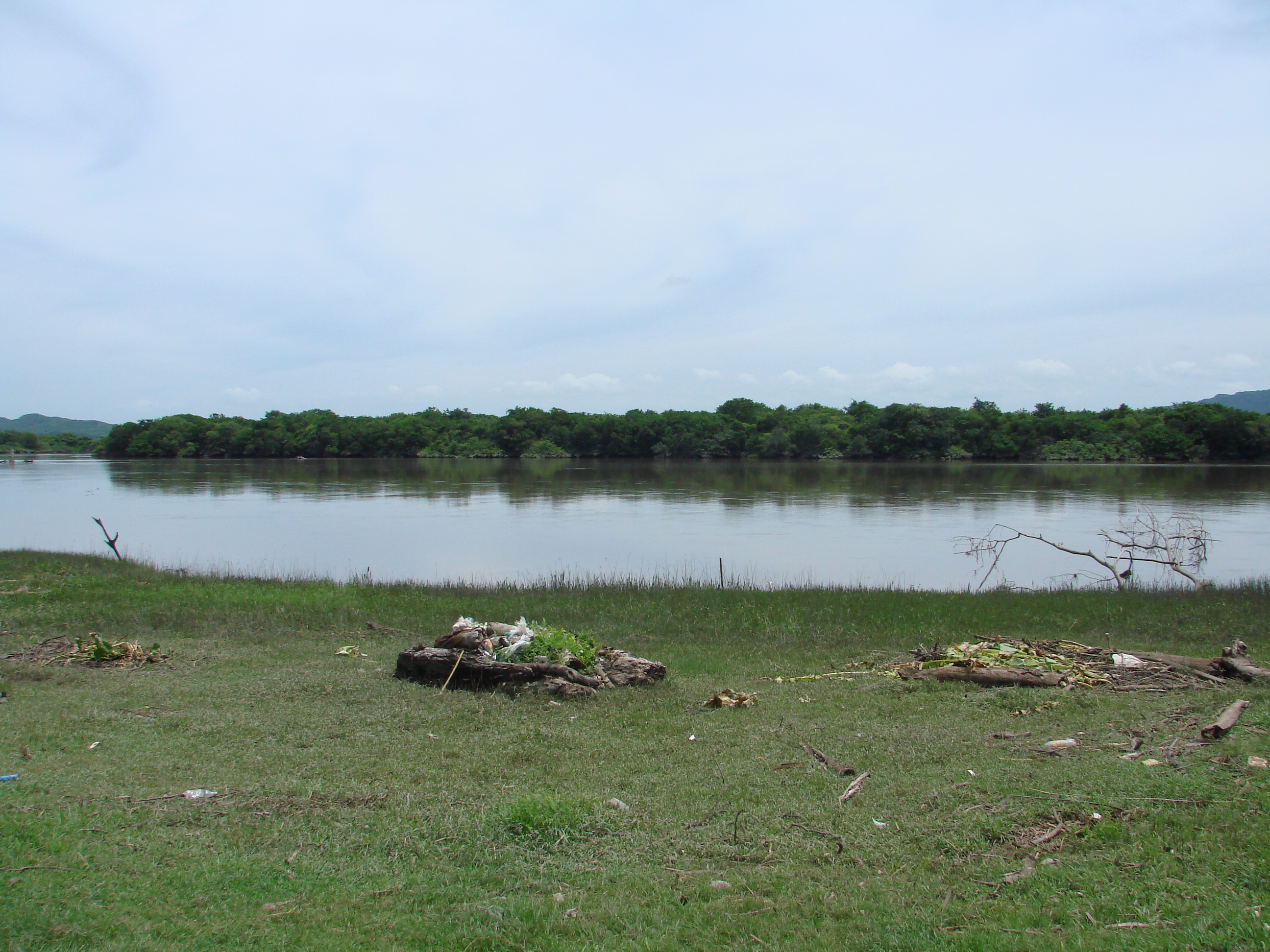 Imbarcadero sul Río Tempisque, Puerto Humo, Guanacaste, Costa Rica.